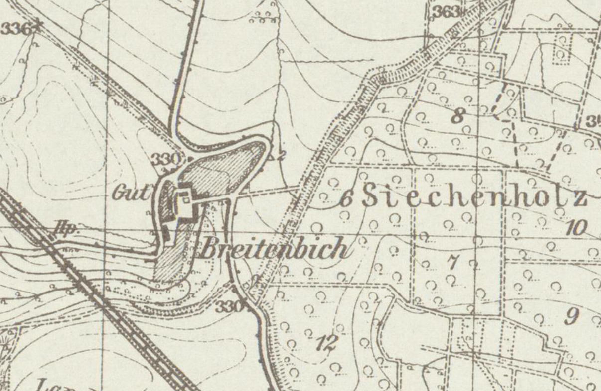 Breitenbich, Gem. Anrode, Unstrut-Hainich-Kreis, Thüringen, Ausschnitt aus dem Meßtischblatt 4728 Mühlhausen von 1868